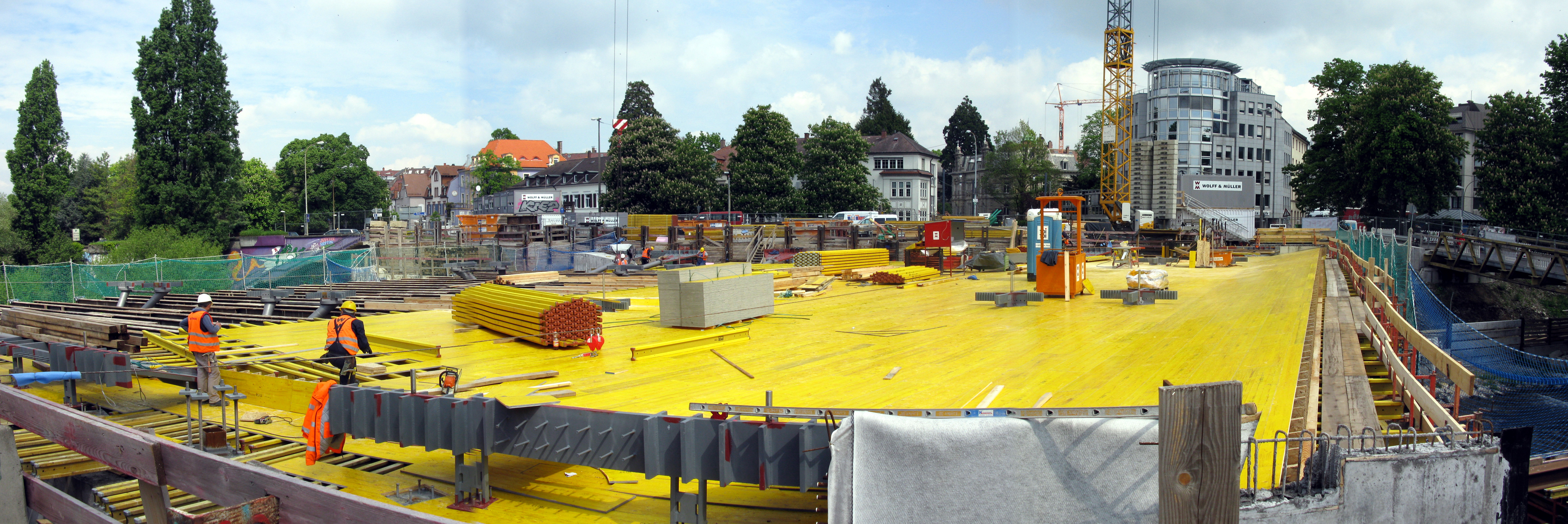 Freiburger Kronenbrücke, Schalungsarbeiten